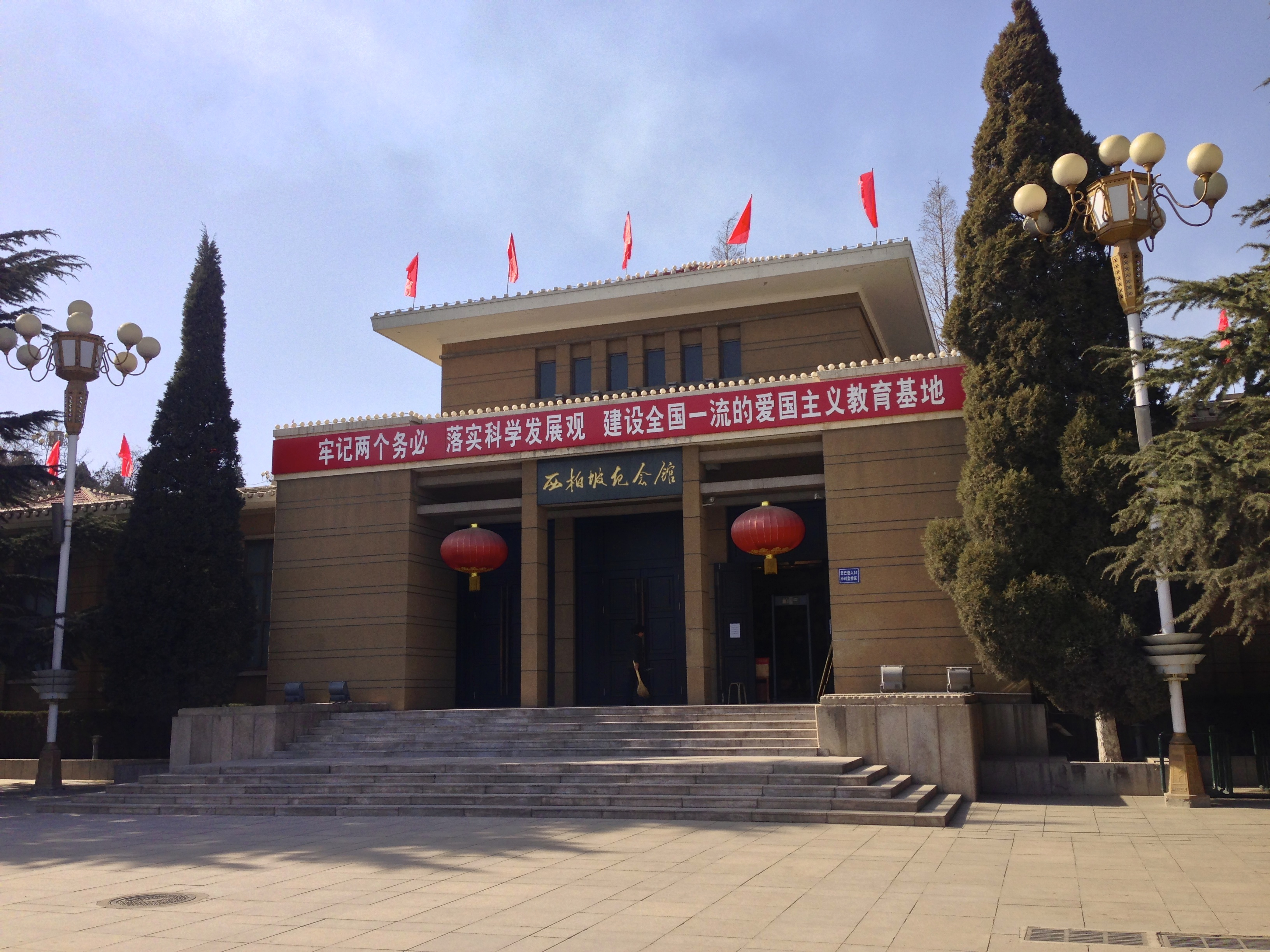 西柏坡紀念館